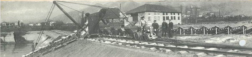 Same Trattori "4R"-10 con rugte metalliche per Decauville